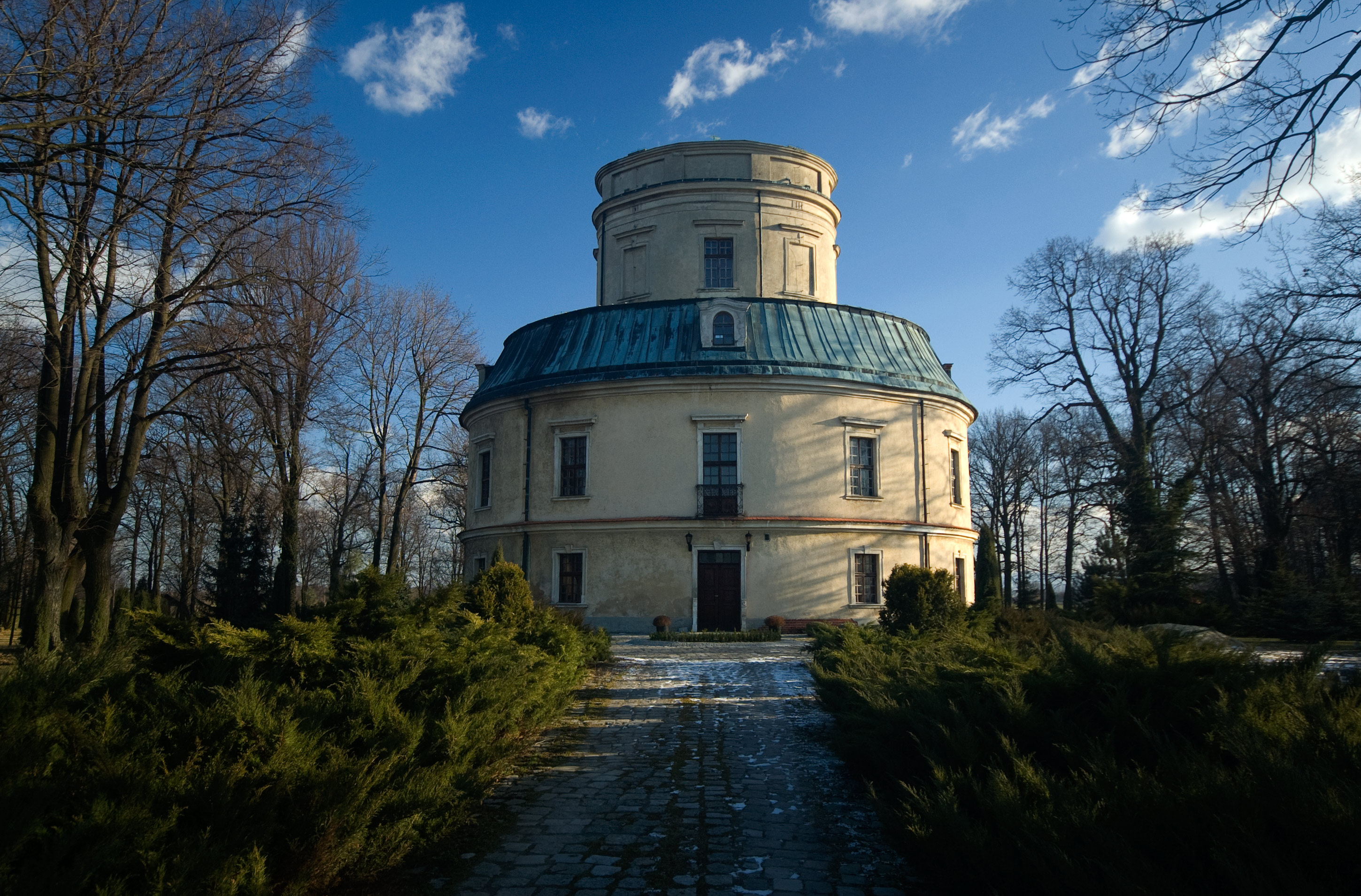 pałacyk myśliwski WierzbnoZwierzyniec (województwo opolskie), Otmuchów 06.1964.